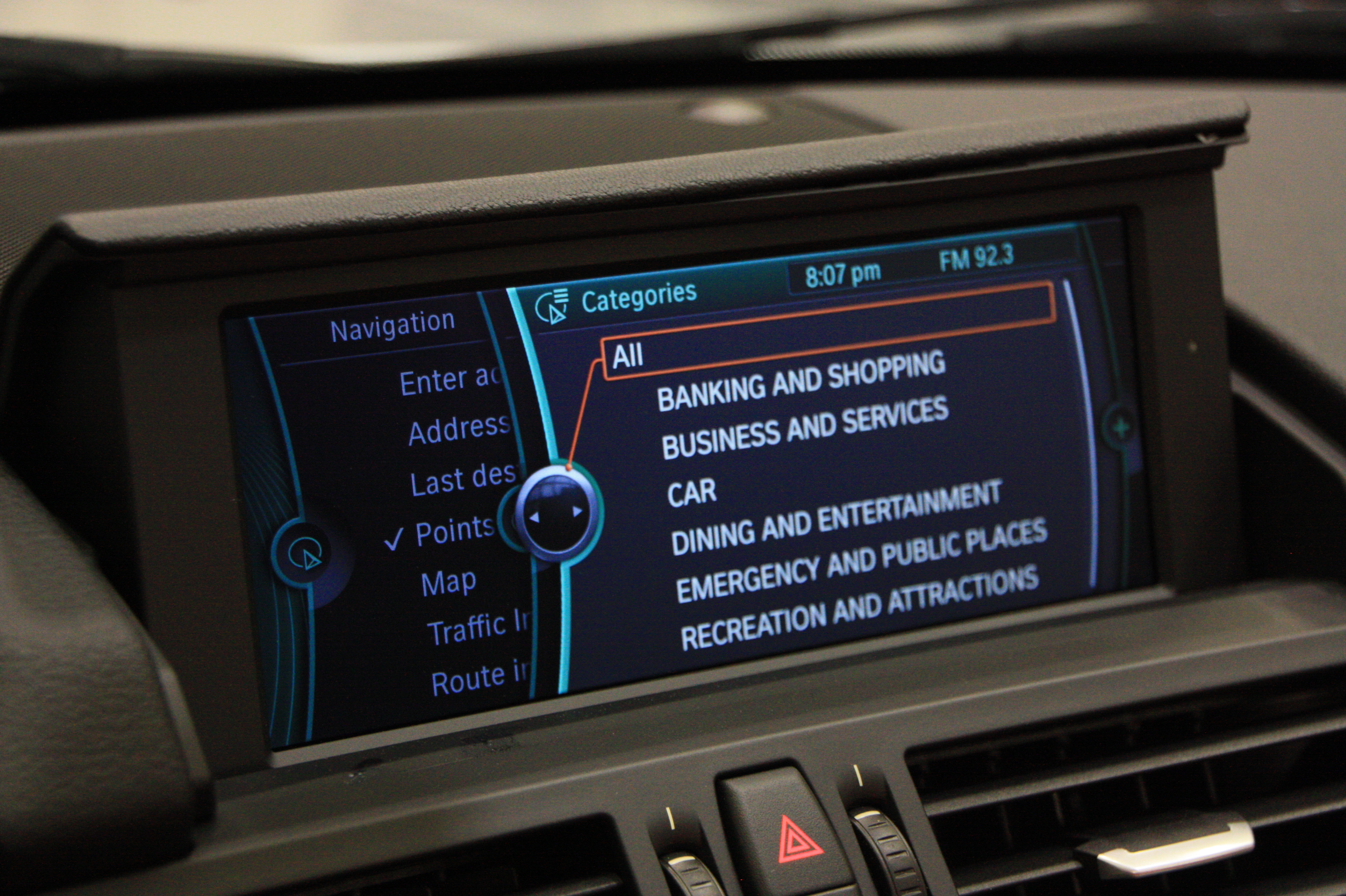 iDrive de la BMW Z4 E89